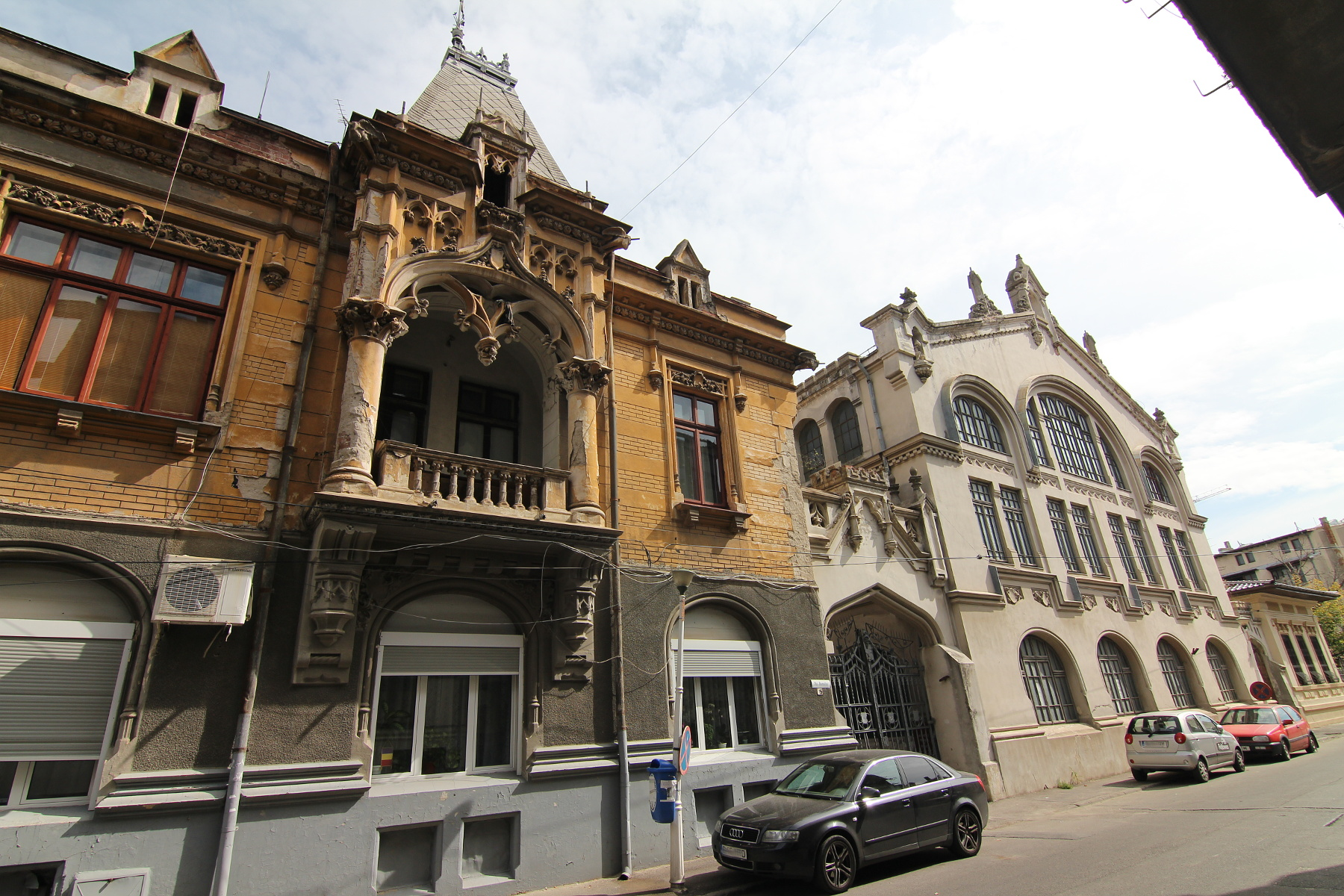 Casă pe Str Romulus